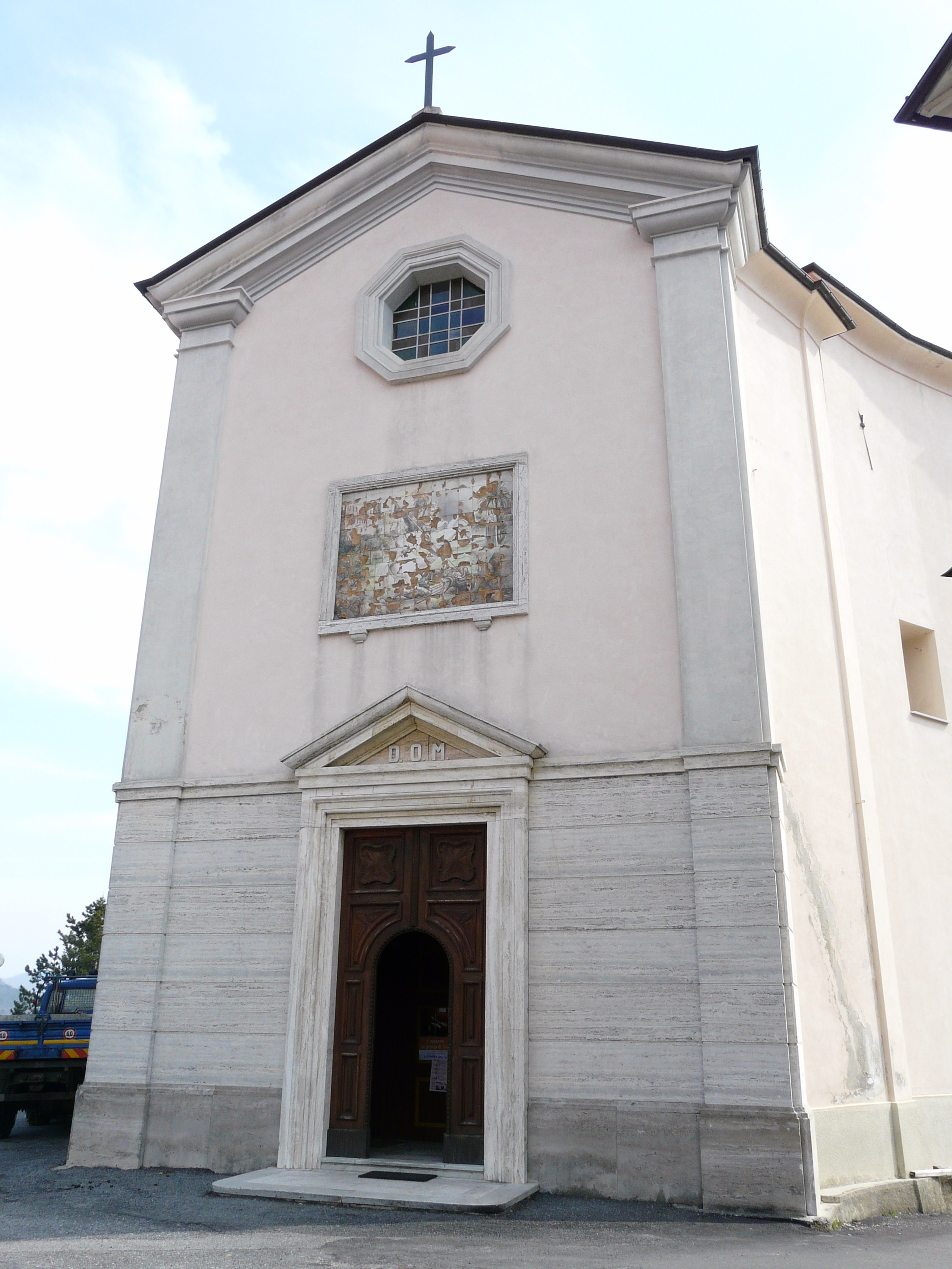 Chiesa di San Giorgio, Bormida, Liguria, Italia